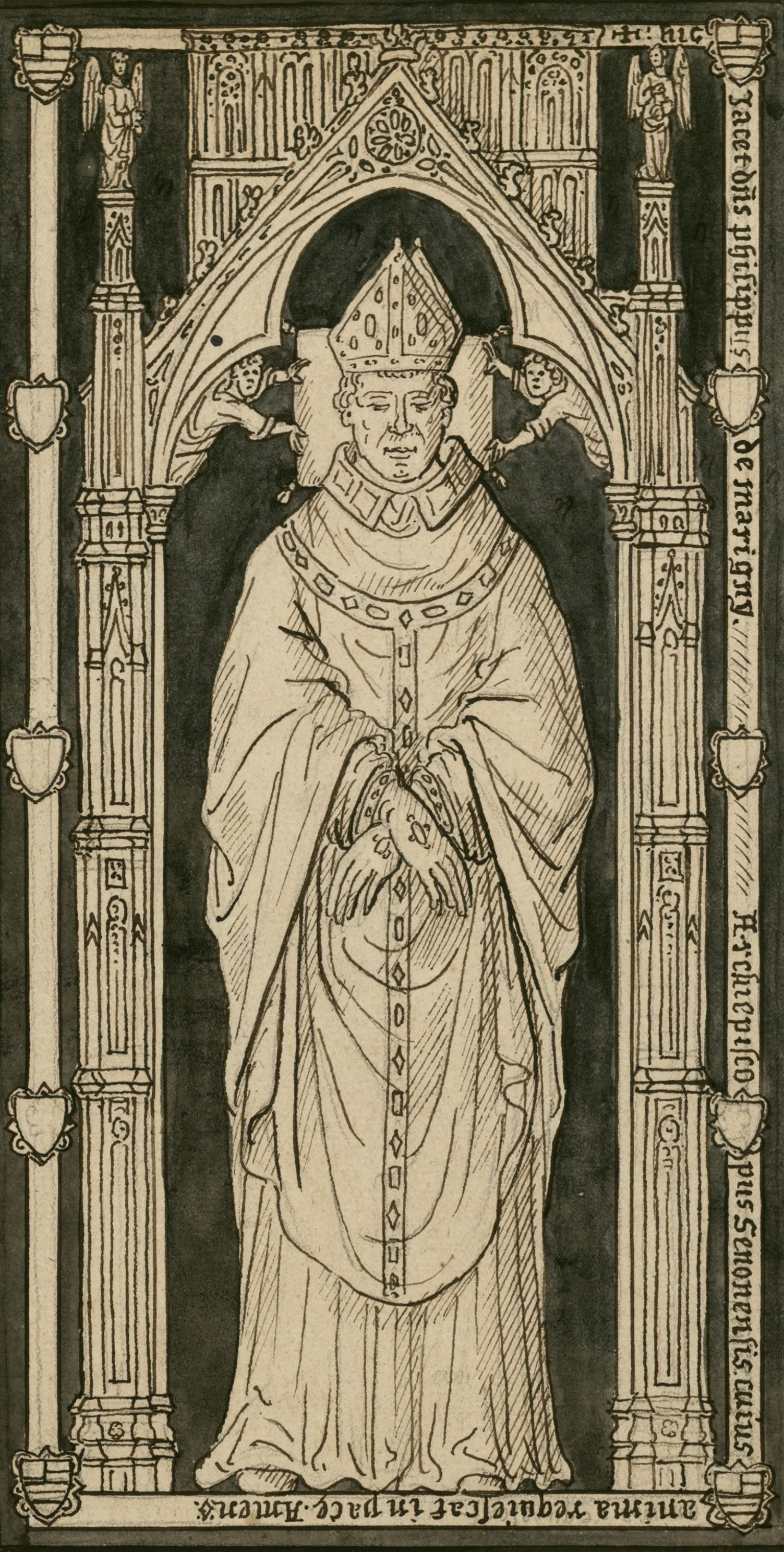 Pierre tombale en marbre noir et blanc, sur laquelle est représentée l'effigie d'un prélat dans un encadrement gothique